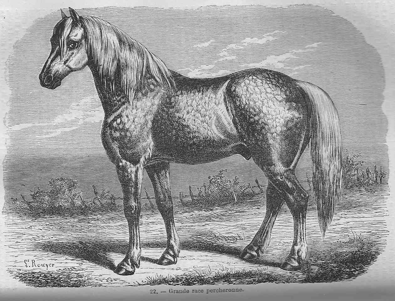 Cheval de grande race percheronne